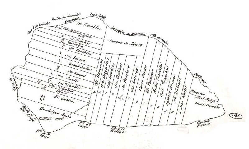 Île aux Coudres, extrait du: Plan de la seigneurie de Beau-Pré, depuis le Sault Montmorency jusqu'à la rivière du Gouffre - 2e feuillet - 15 arpents : 1 po . - 1751 - 1 plan(s) : manuscrit en noir et blanc ; 63 x 125 cm Sur ce plan de la seigneurie de la Côte-de-Beaupré figurent l'Île aux Coudres, la paroisse de Baie-Saint-Paul, les rivière du Gouffre, Rouge et du Moulin, les caps aux Pierres, Gribane, Rouge, Maillard et aux Corbeaux, les ruisseaux la Vieille Rivière, du Millieu et de la Goudronnerie, le cours d'eau agricole Bouchard-Gauthier, le lieu-dit Sault-au-Cochon, le lac de l'Ange, la pointe des Roches ou Cap à l'Aigle, le relief, la dimension des lots, l'église, les battures, les anses, le moulin à scie, les îles, le réseau hydrographique, les toponymes français et 112 noms de propriétaires.